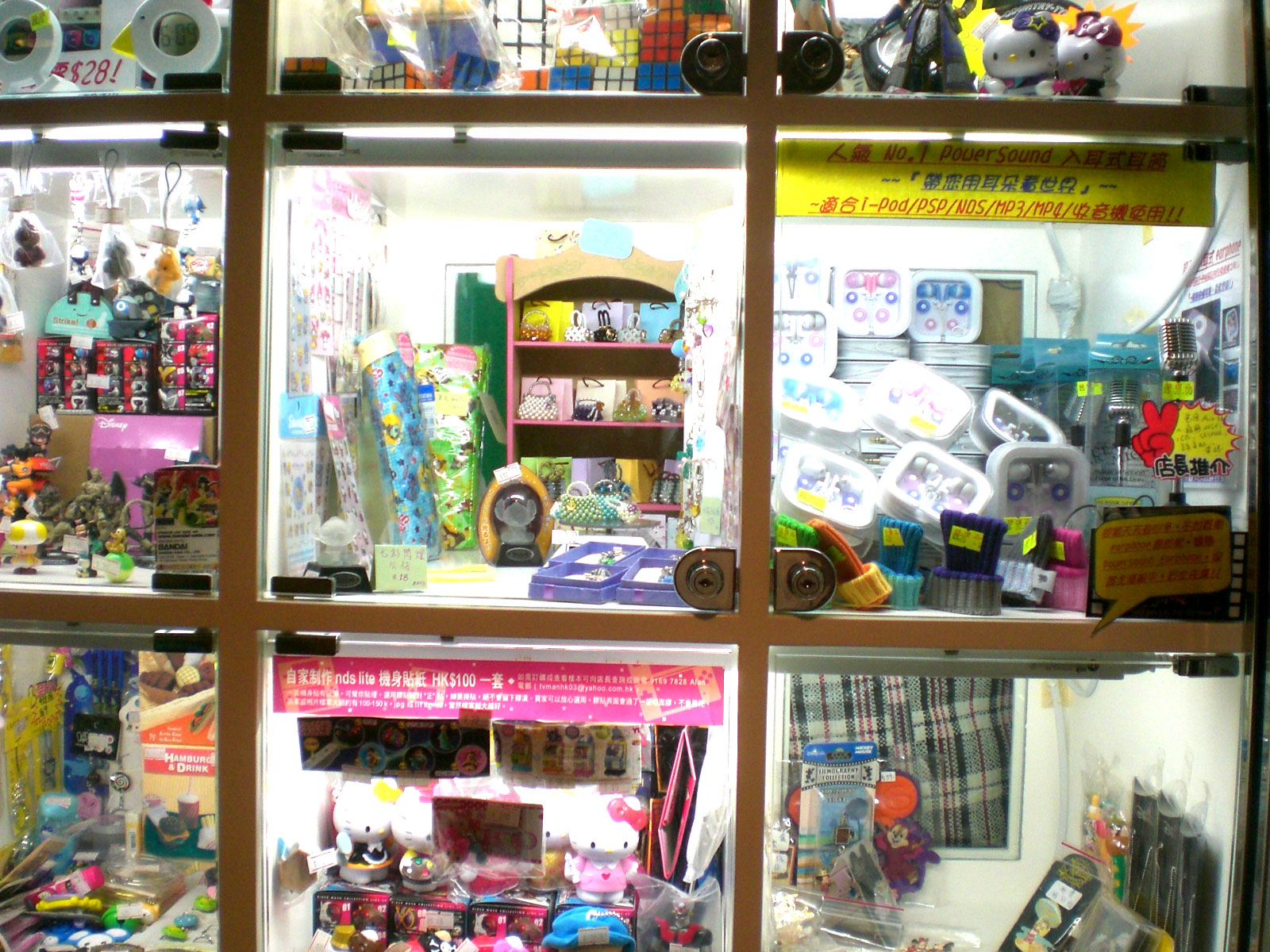 灣仔英皇集團中心商場格仔店